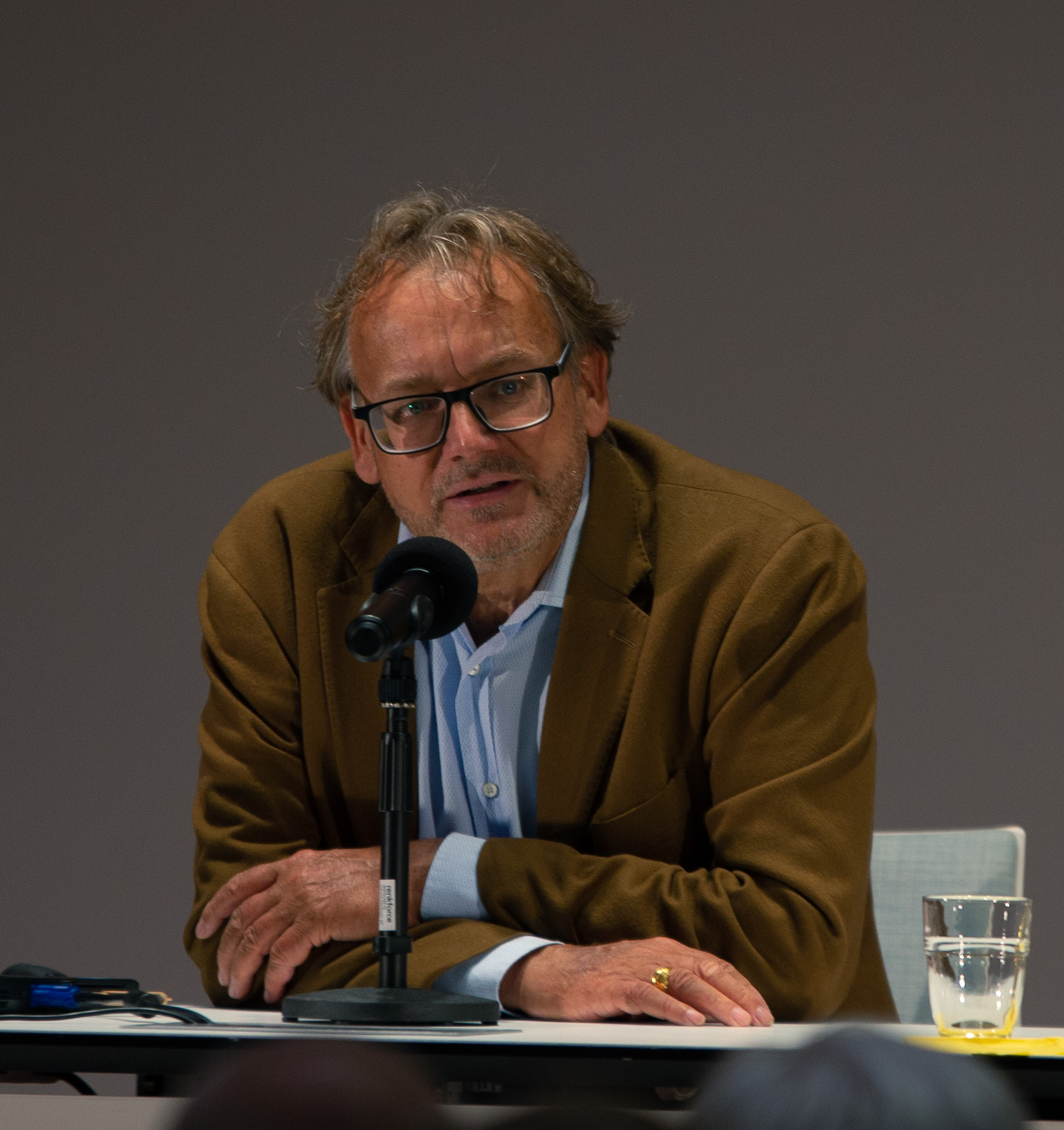 Harald Meller in der Stadtbibliothek Nordhausen (Thüringen)